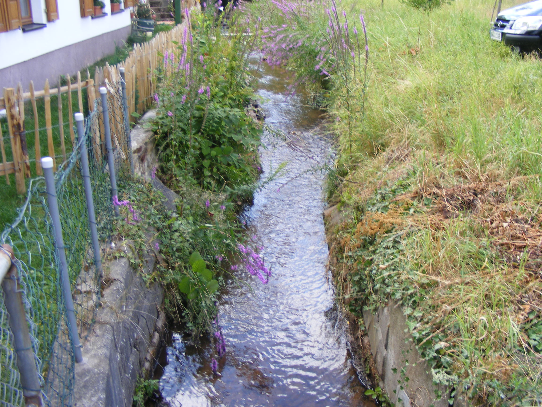 Der Mußbach am Ortsrand von Gimmeldingen